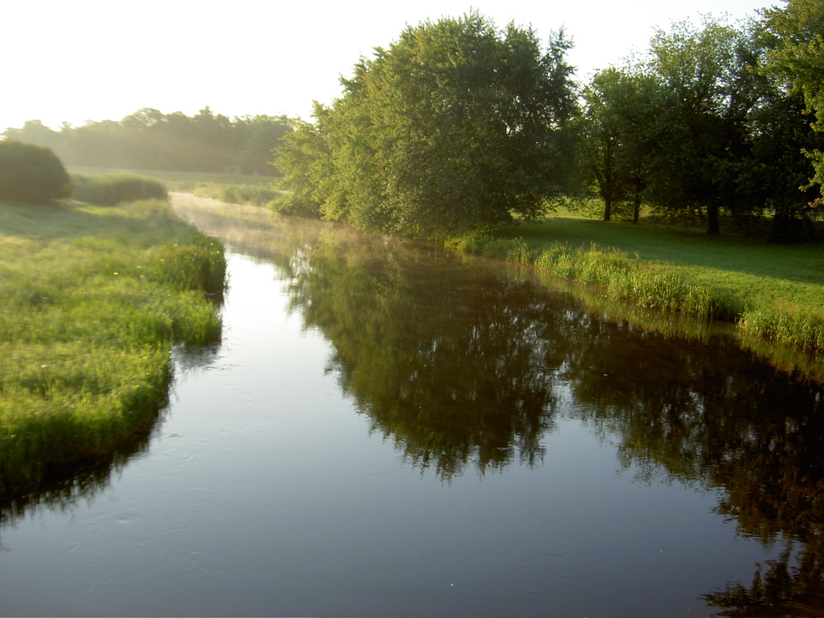 Schwarze Elster in Jessen, Sachsen-Anhalt